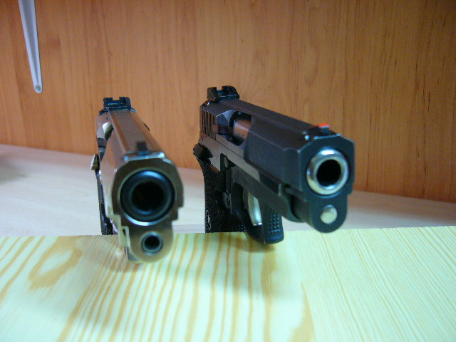 Pistolet FIRESTAR M43 (Star Bonifacio Echeverria S.A.)